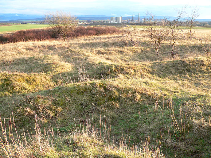 Sichtbar gewordene Bodenreste der Pfalz Werla durch Ausgrabungen. Foto aufgenommen von Benutzer Benutzer:AxelHH